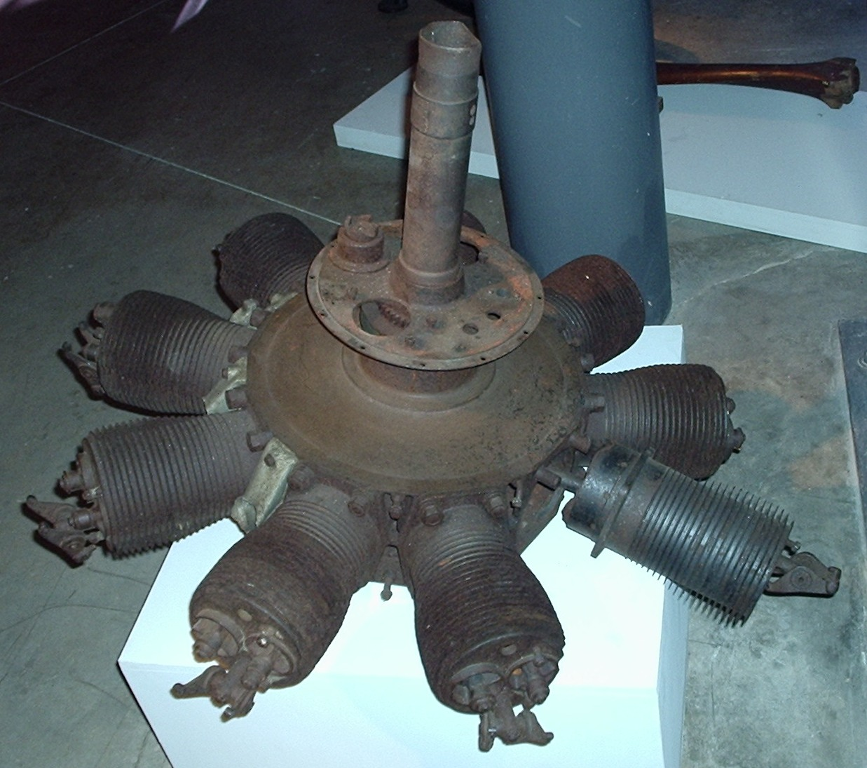 Motor do hidroplano Morane-Borel, doado em 1919 à Polícia Militar do Paraná, em exposição no Museu Paranaense.